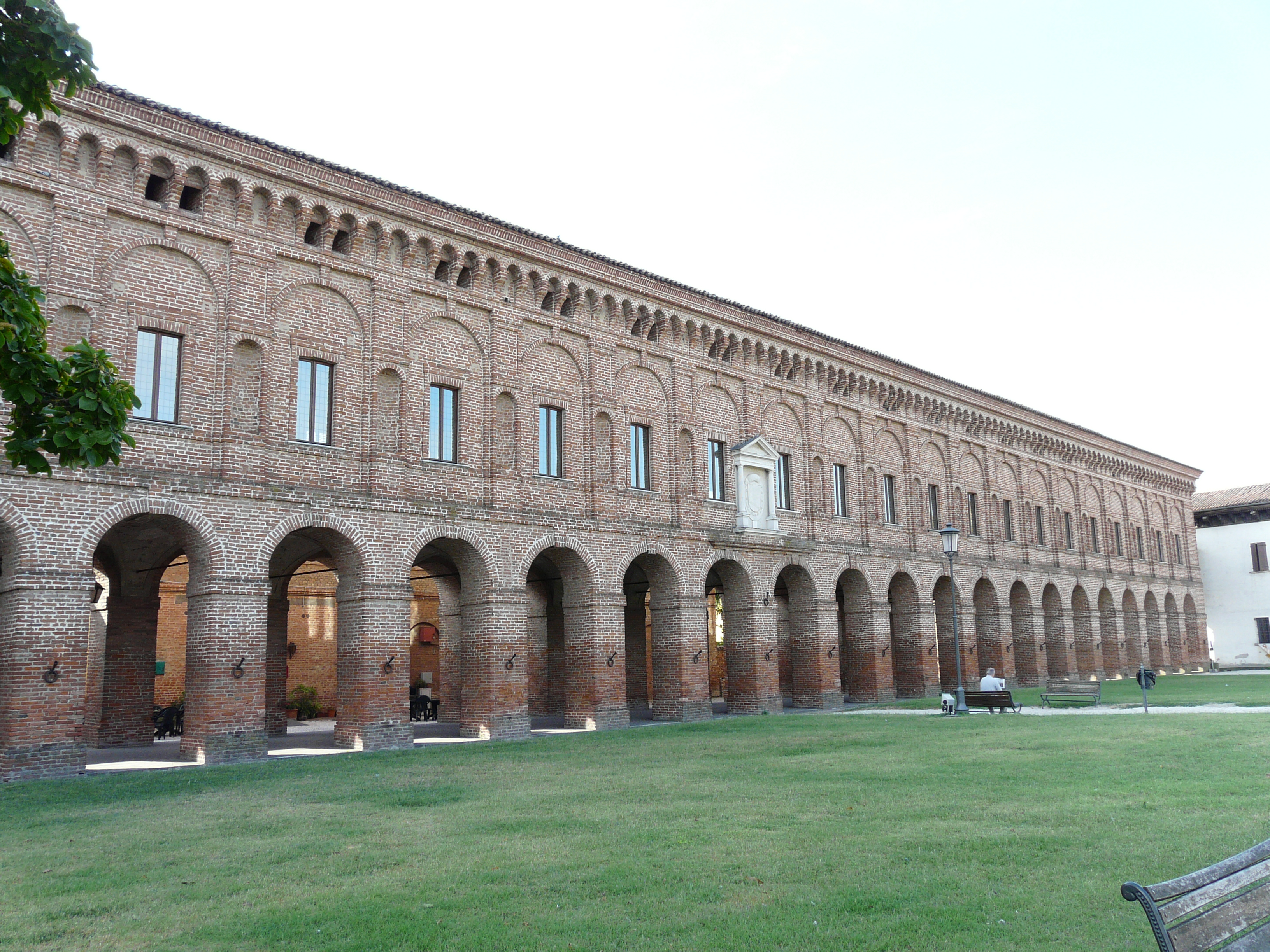 Galleria degli Antichi, Sabbioneta, Lombardia, Italia